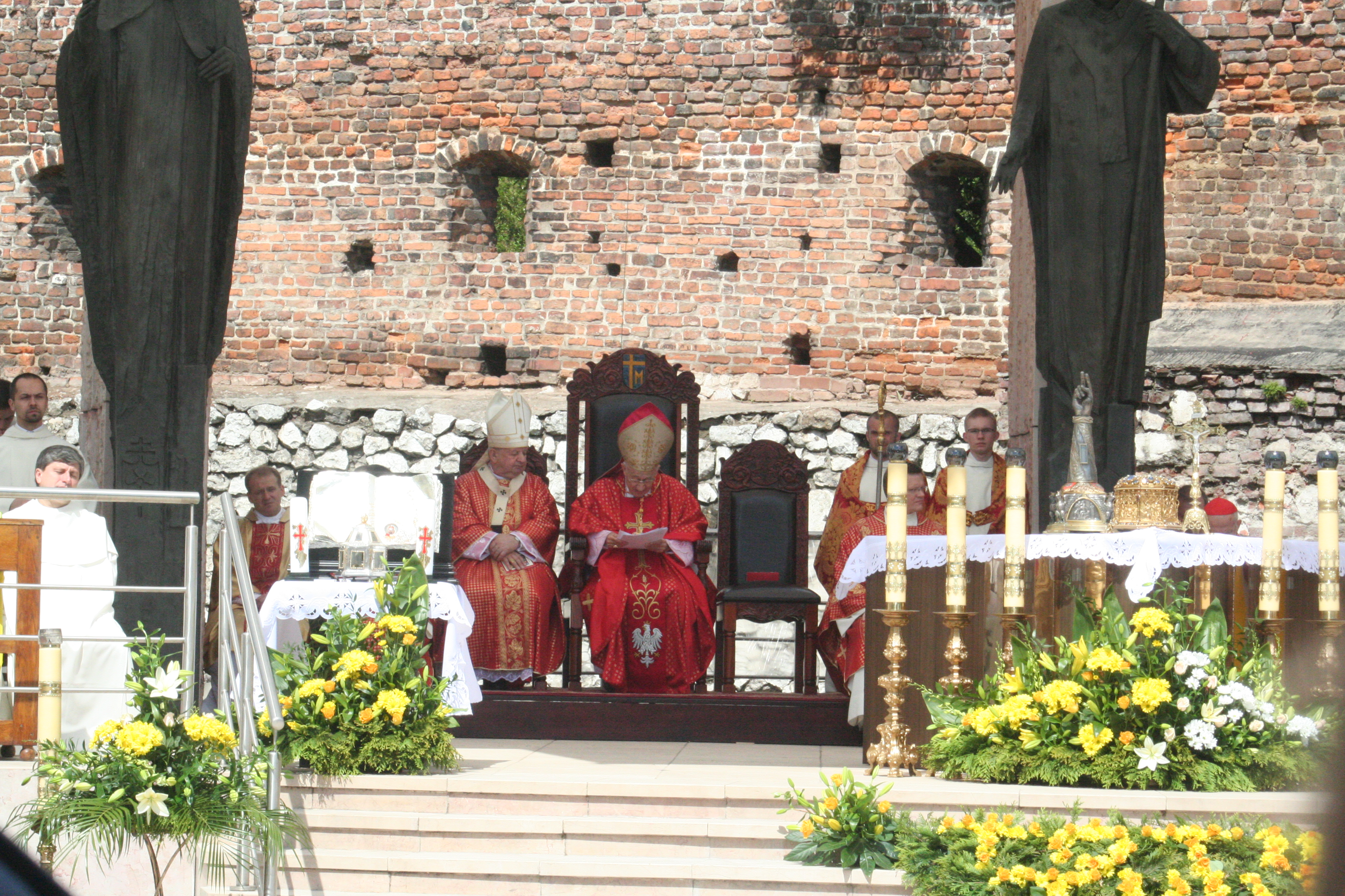 Tradycyjna Procesja ku czci św. Stanisława z Wawelu na Skałkę. Eucharystia - Kulminacyjny element tradycyjnej procesji św. Stanisława w Krakowie. Kardynał Camillo Ruini podczas homilii.